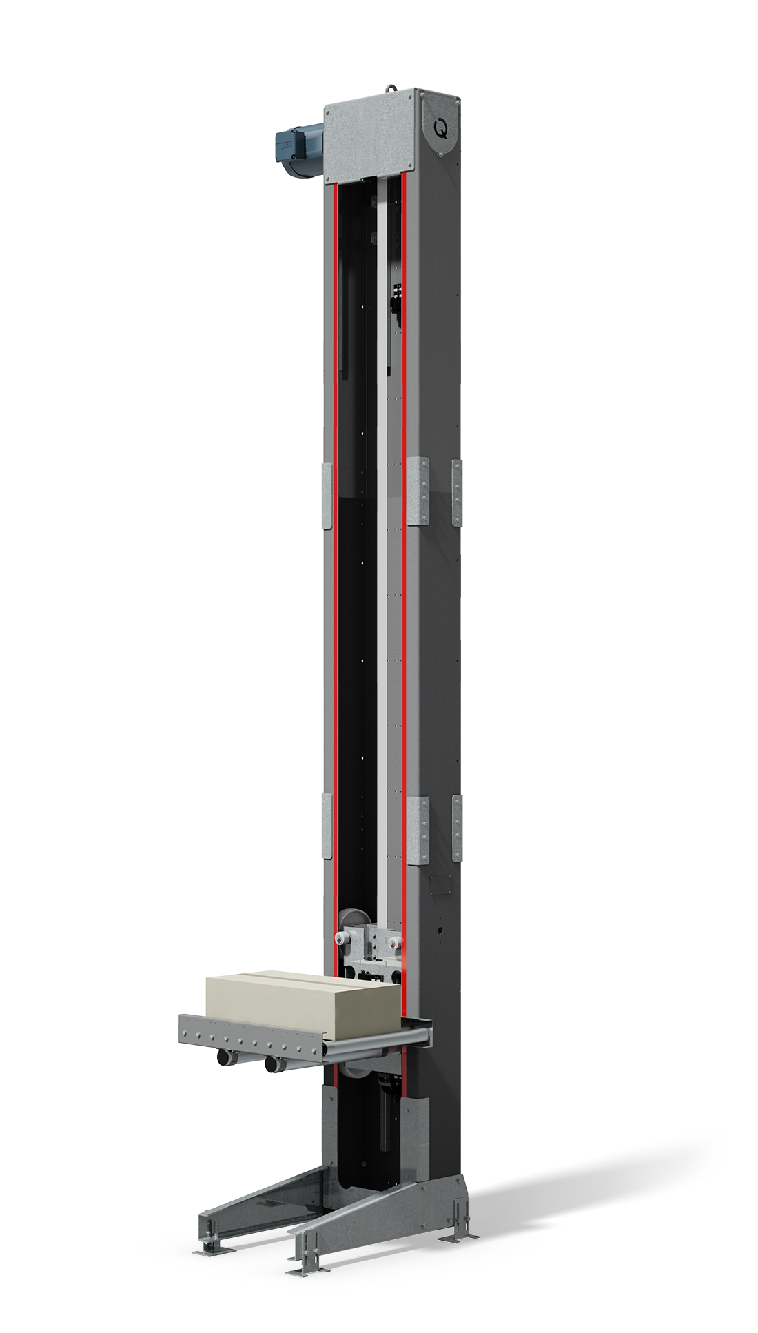 Dit is een voorbeeld van een Discontinu lift. Deze lift brengt een product weg, en komt met lege drager weer terug.